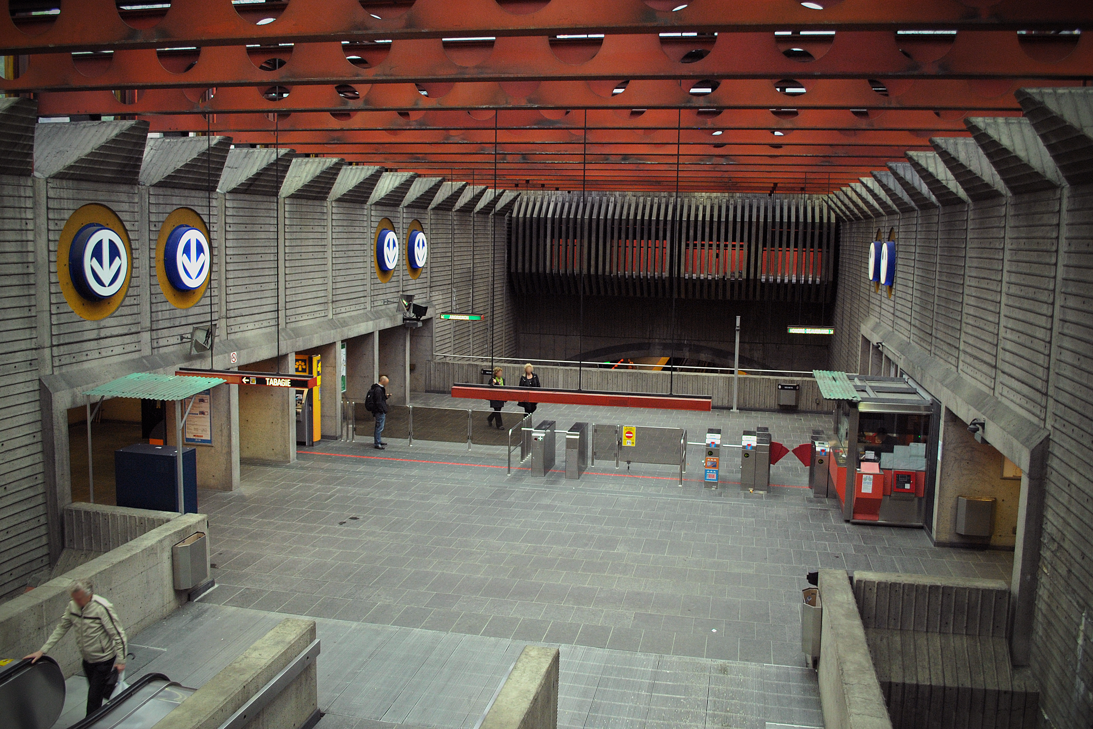 Station Préfontaine du Métro de Montréal